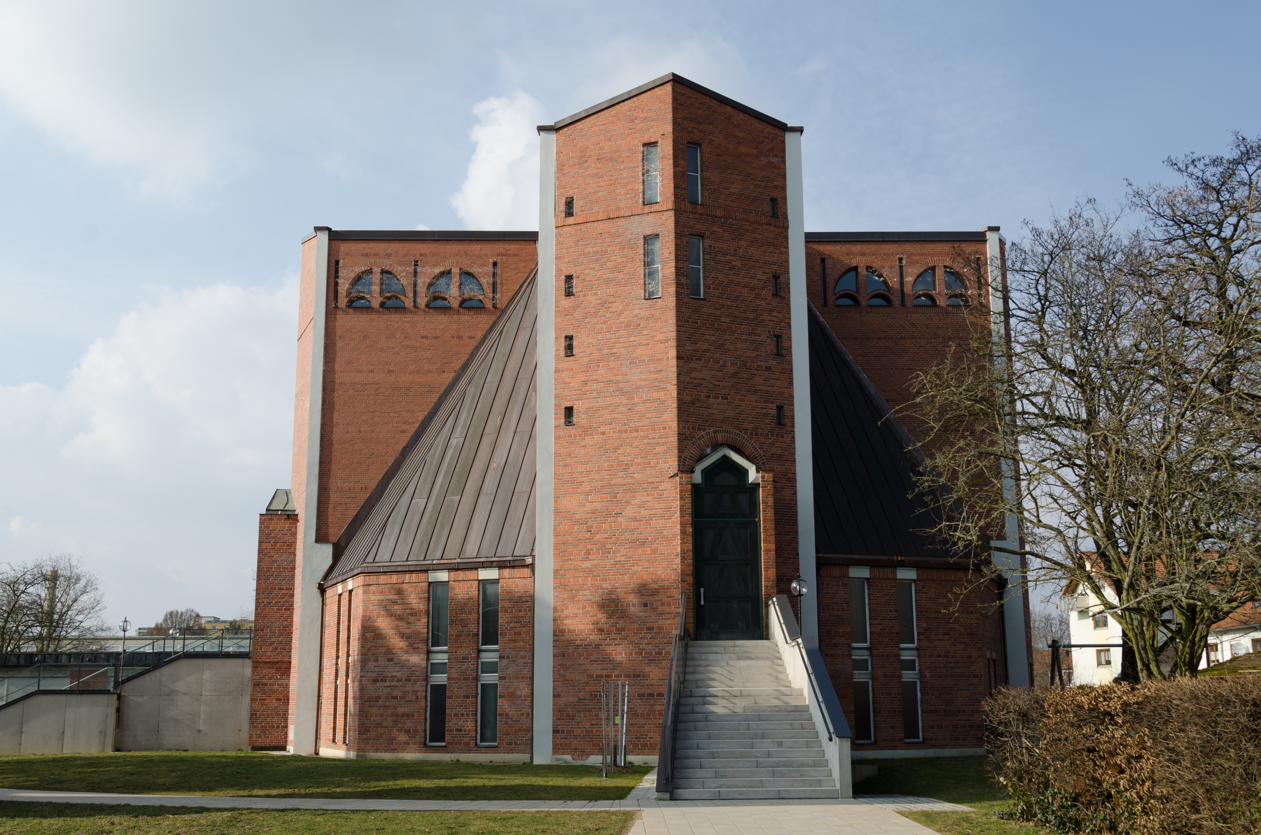 Schweinfurt, Brombergstraße 73